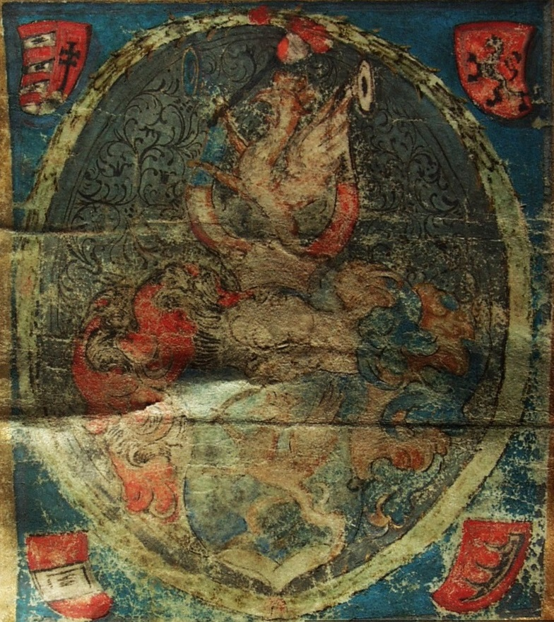 II. Mátyás magyar király által 1618-ban adományozott eredeti címer